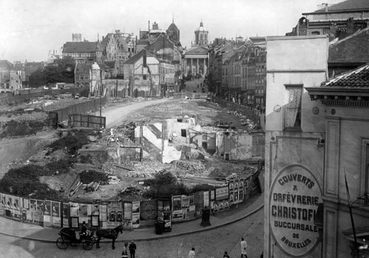 Destruction du quartier St.Roch (Mont des Arts) 1898